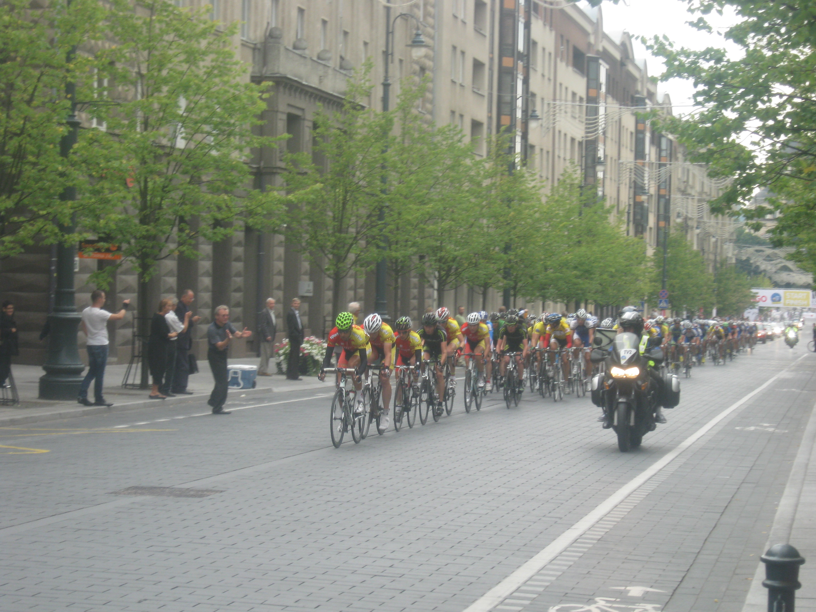 Baltic Chain Tour 2012, 5th Stage - Vilnius